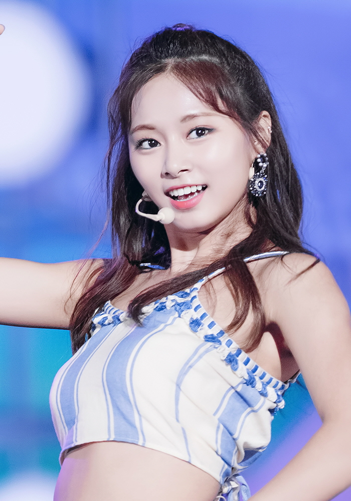 180717 열린음악회 트와이스